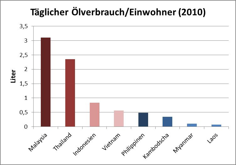 Täglicher Mineralölverbrauch je Einwohner (Stand 2010)